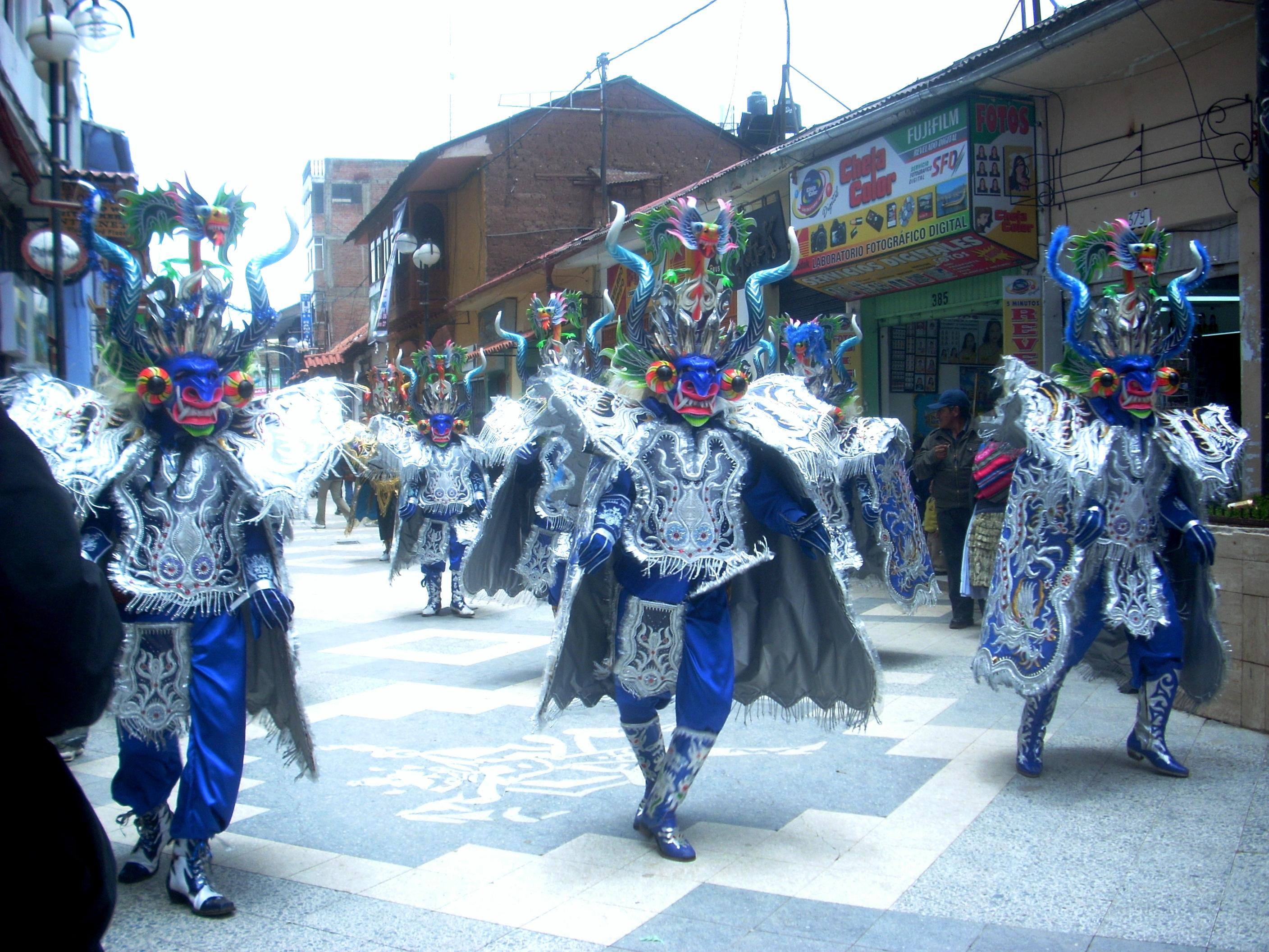 Festividad Candelaria De PUNO-PERU Danza: Diablada (Juli-Region Puno)